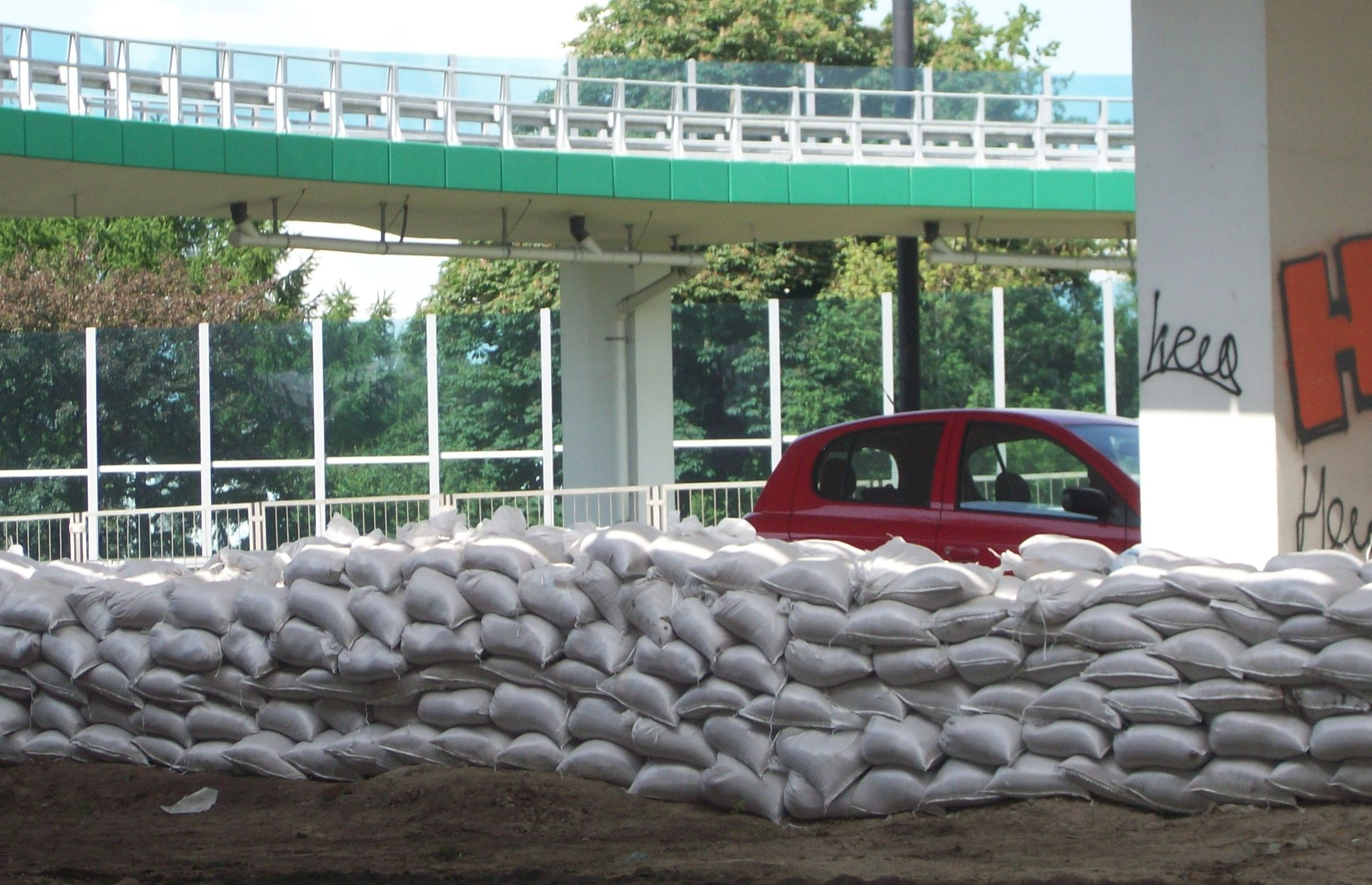 Zabezpieczenia przeciwpowodziowe na Wale Miedzeszyńskim w Warszawie, pod estakadami Trasy Łazienkowskiej.